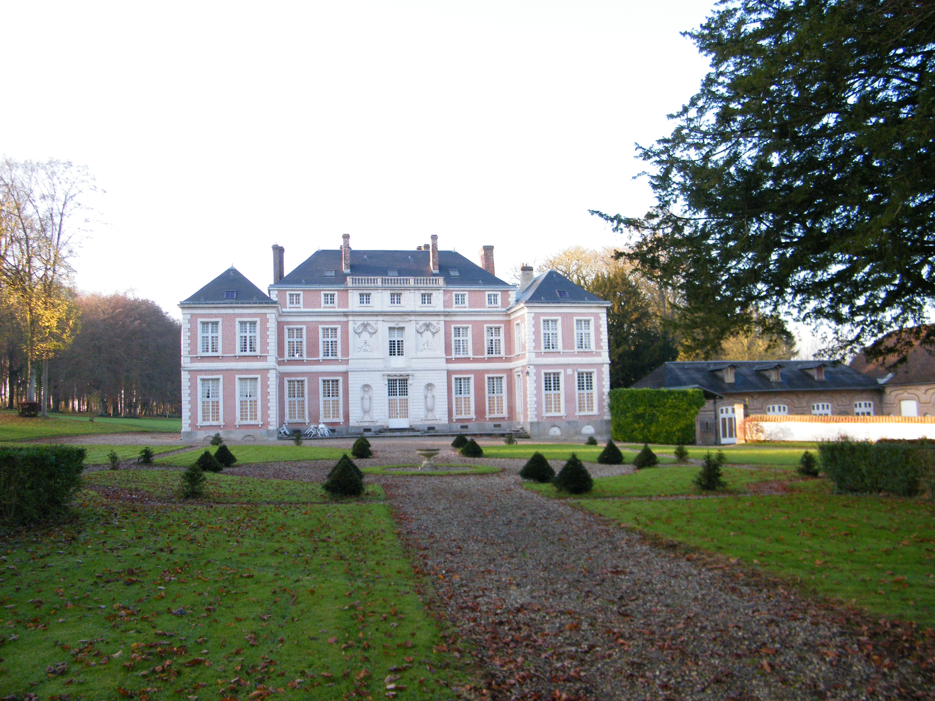 Commune.